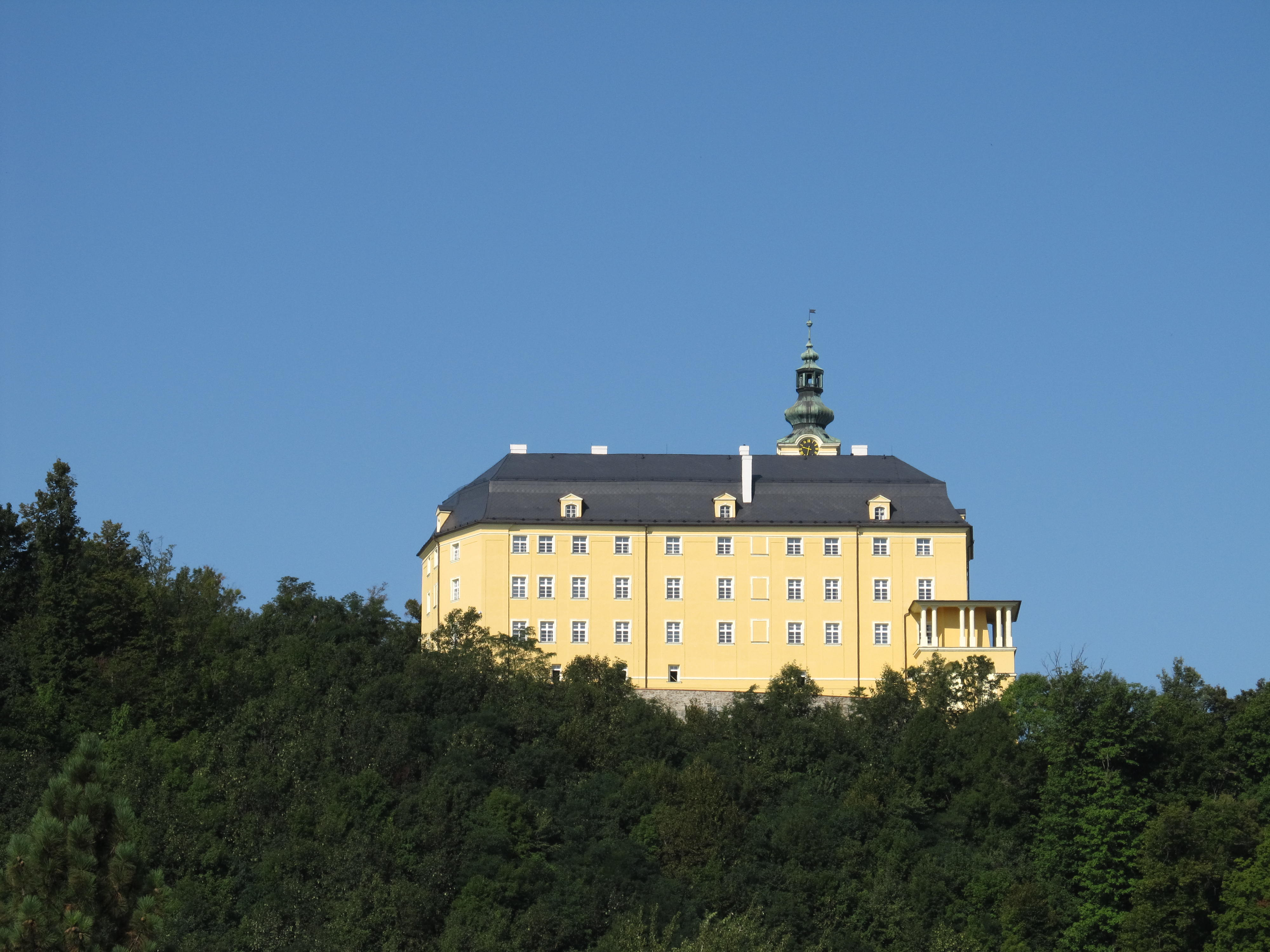 Pohled na Horní zámek od východu